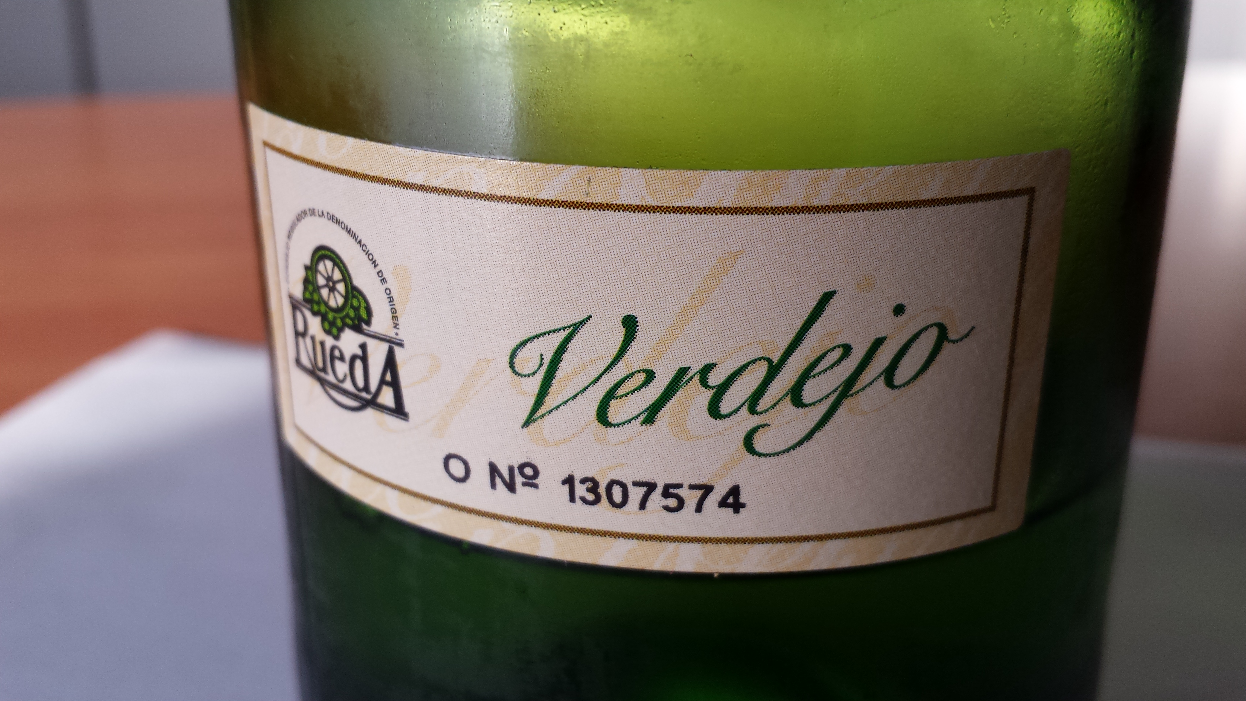 Etiqueta de la denominación de origen Rueda